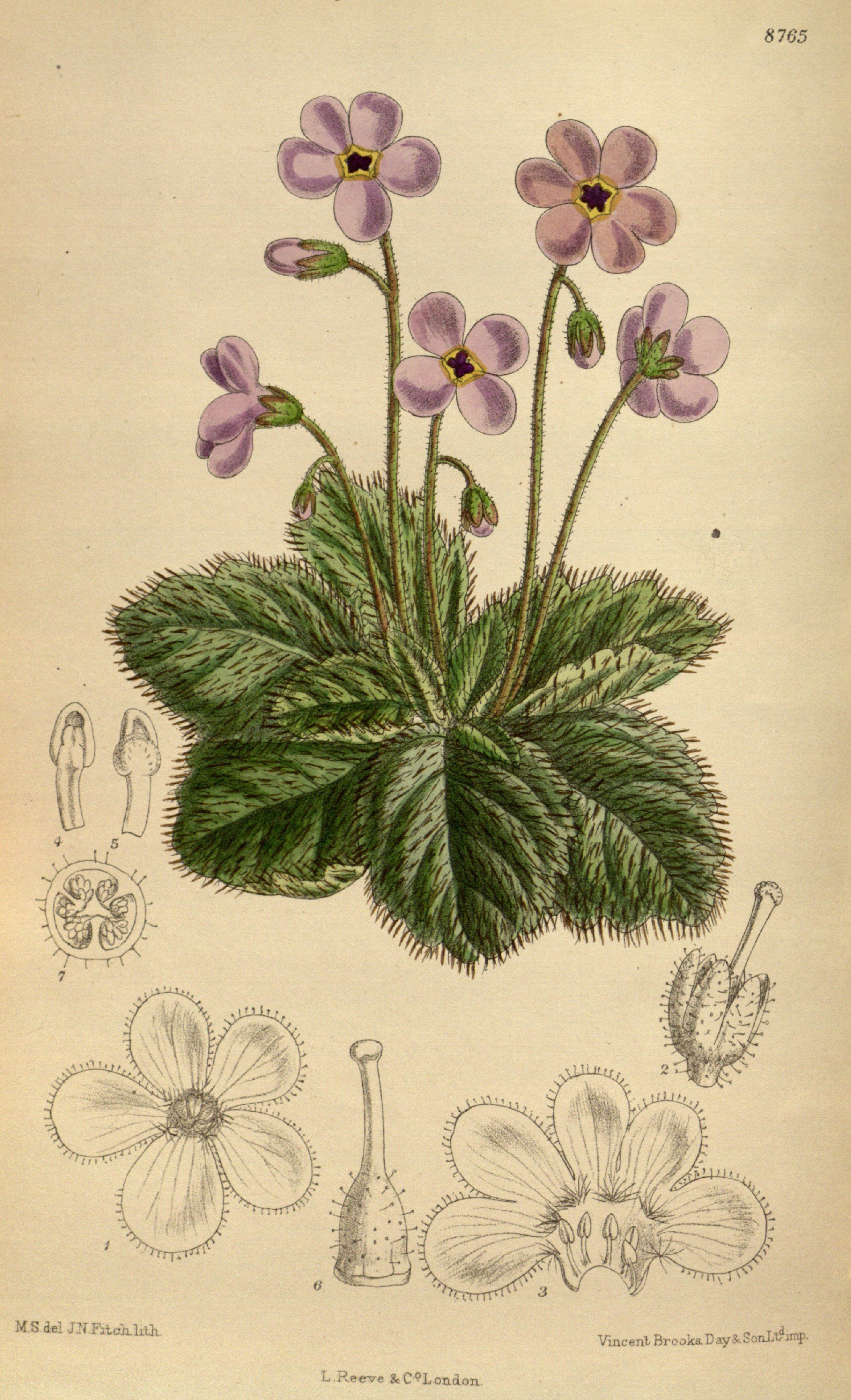 Ramondia serbica (= Ramonda serbica), Gesneriaceae